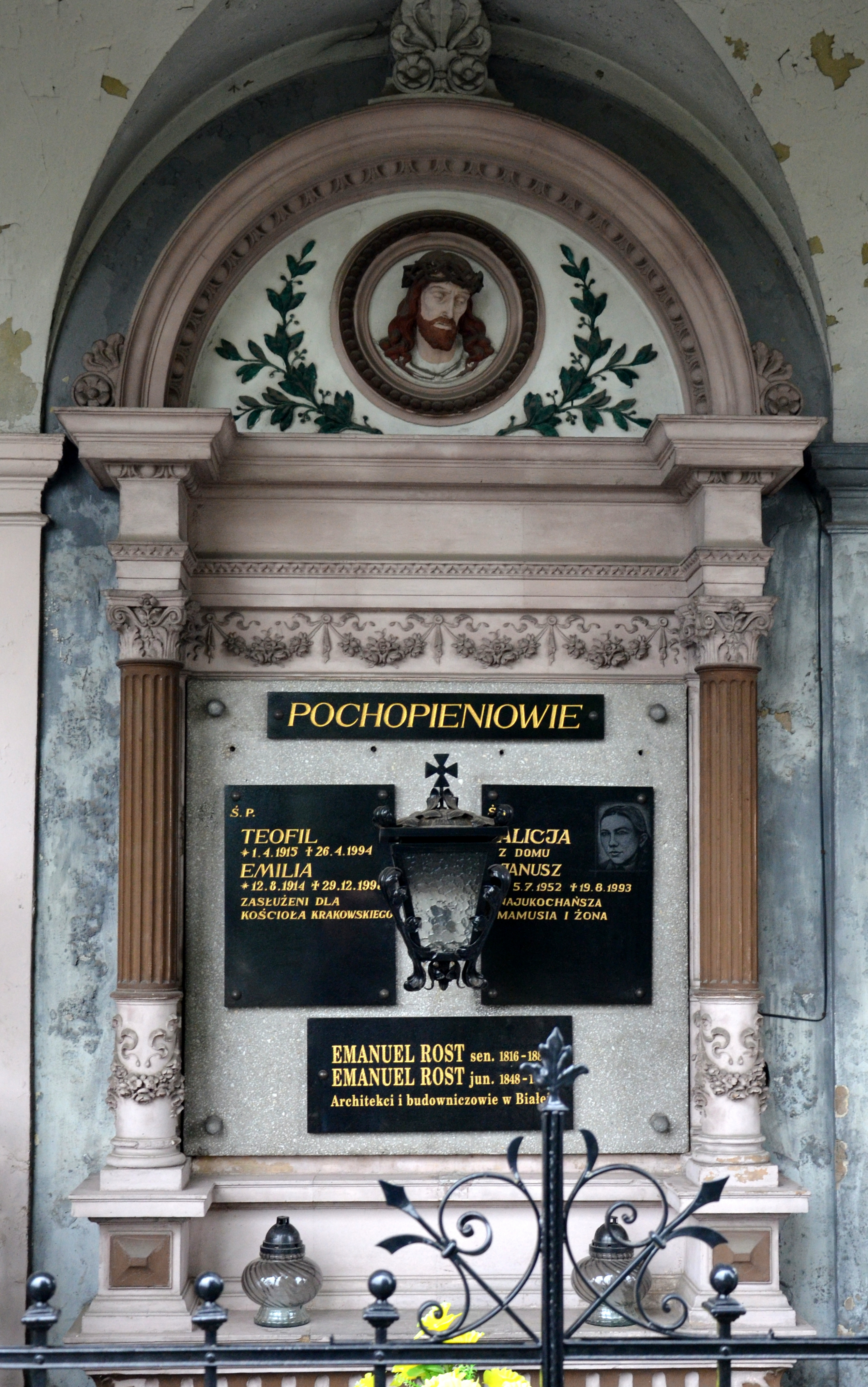 Der Biała Katholische Friedhof